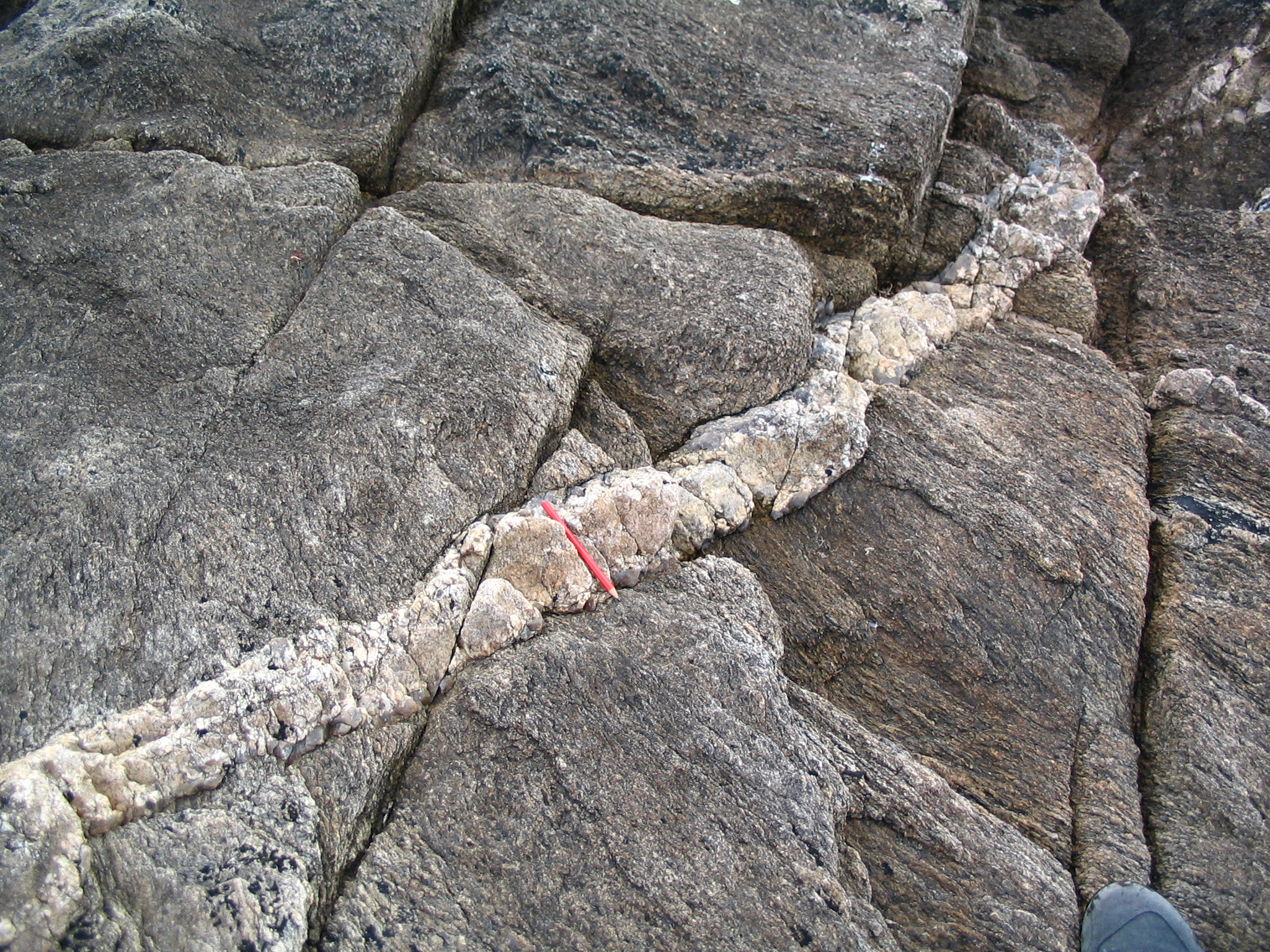 La Chaume près des Sables d'Olonne, Vendée, F. filon de pegmatite dans les gneiss environnants